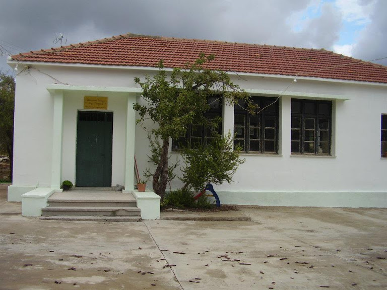 Πασαλίτες: Διδακτήριο έτους 1963